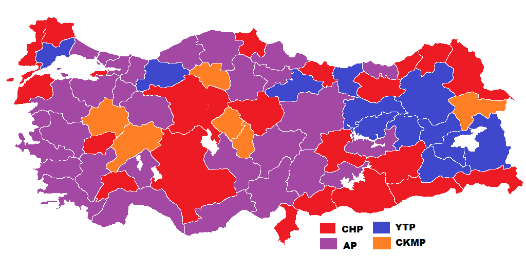 1961 genel seçimleri sonuçlarının Türkiye haritasında gösterimi